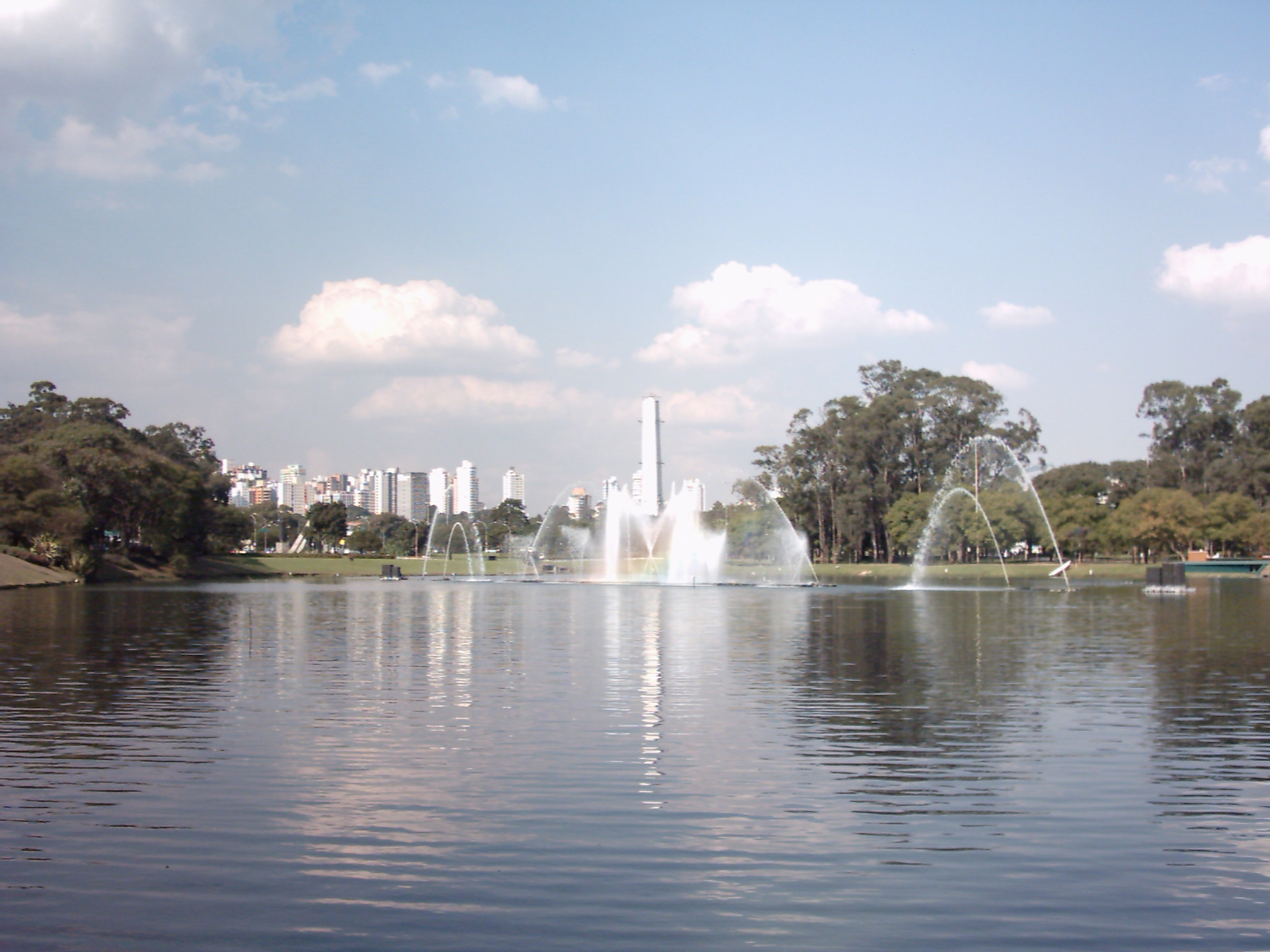 Lago do Ibirapuera